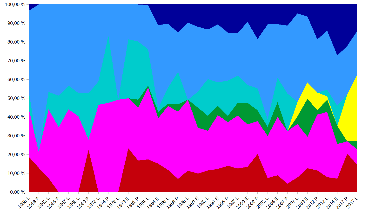 Evolution du paysage politique français depuis 1958 à nos jours. Extrême-Droite (en bleu foncé) ; Droite (en bleu) ; Centre-droit (en bleu-clair) ; Centre et centre-gauche (en jaune) ; Écologistes (en vert) ; Gauche (en rose) ; Extrême-Gauche à gauche radicale (en rouge).